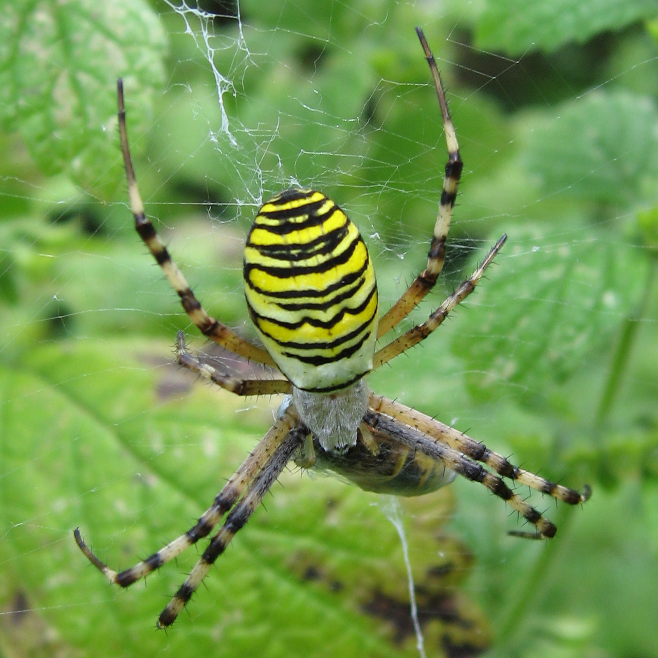 Photo prise à Clabecq (Belgique, Brabant Wallon) en août 2006. D'après mes investigations Wikipédia, il s'agirait d'une Argiope Bruennichi, avec sa proie emballée "prête à consommer".